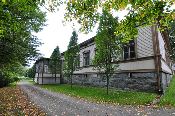 Päällikkö 2, rakennus nro. 8 Eureninkadun varressa